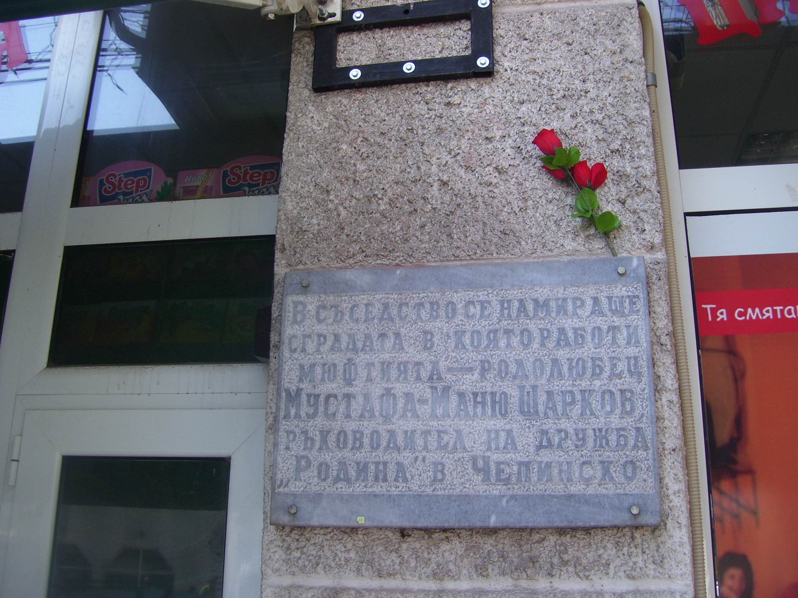 Паметна плоча на Маню Шарков във Велинград.